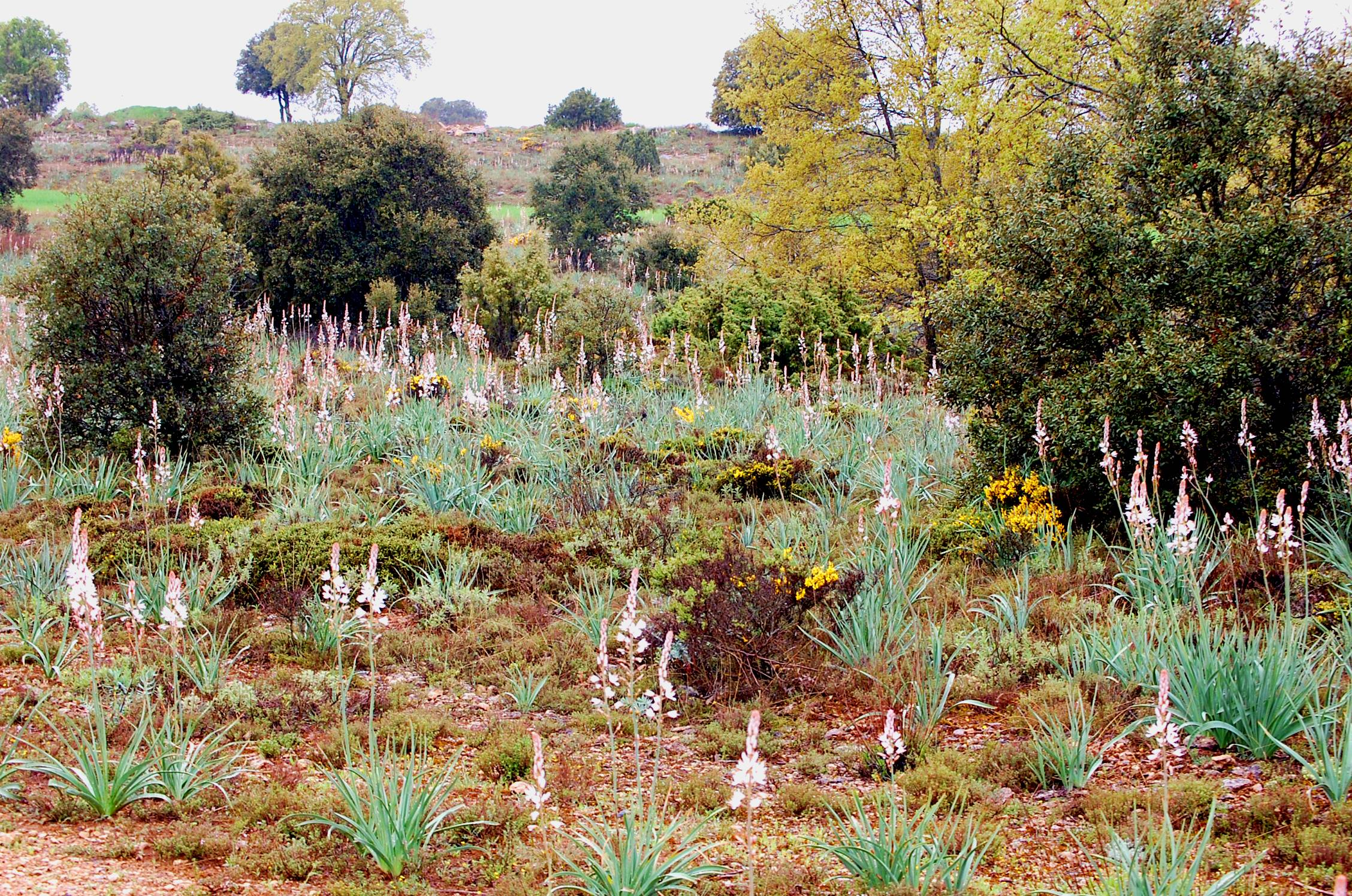 Vista de bosque mixto de encinas (Quercus rotundifolia), quejigos (Quercus faginea) y gamones en Torrecuadrada de los Valles (provincia de Guadalajara, España).